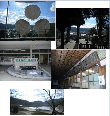 安芸高田市二段目左:File:Yachiyonooka2.JPG by ToshiJaponほか出所不明